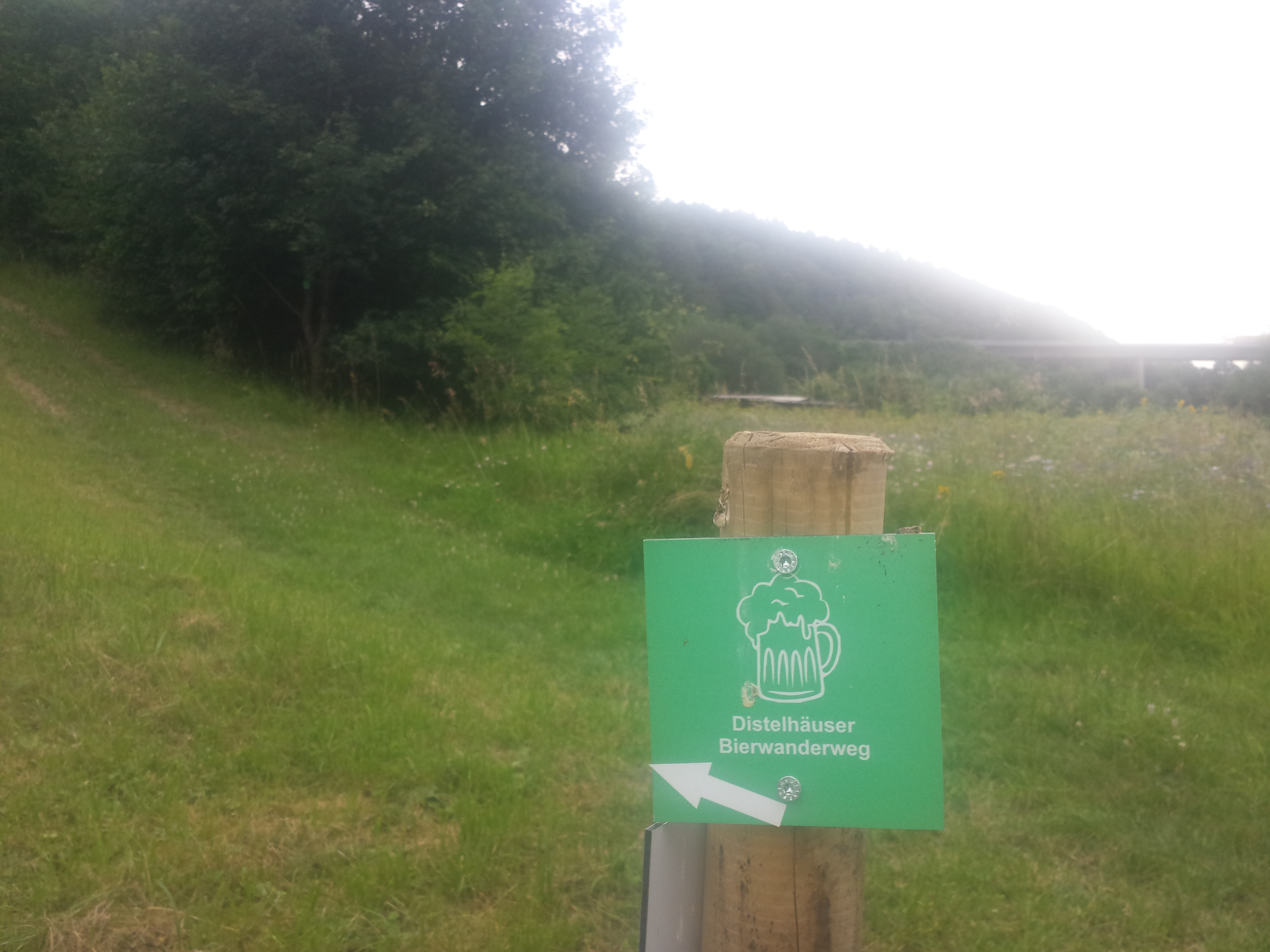 Hinweisschild für den Distelhäuser Bierwanderweg in Distelhausen bei Tauberbischofsheim im Main-Tauber-Kreis, Baden-Württemberg. Im Hintergrund ist die Autobahnbrücke der A 81 zwischen Distelhausen und Dittigheim zu sehen.